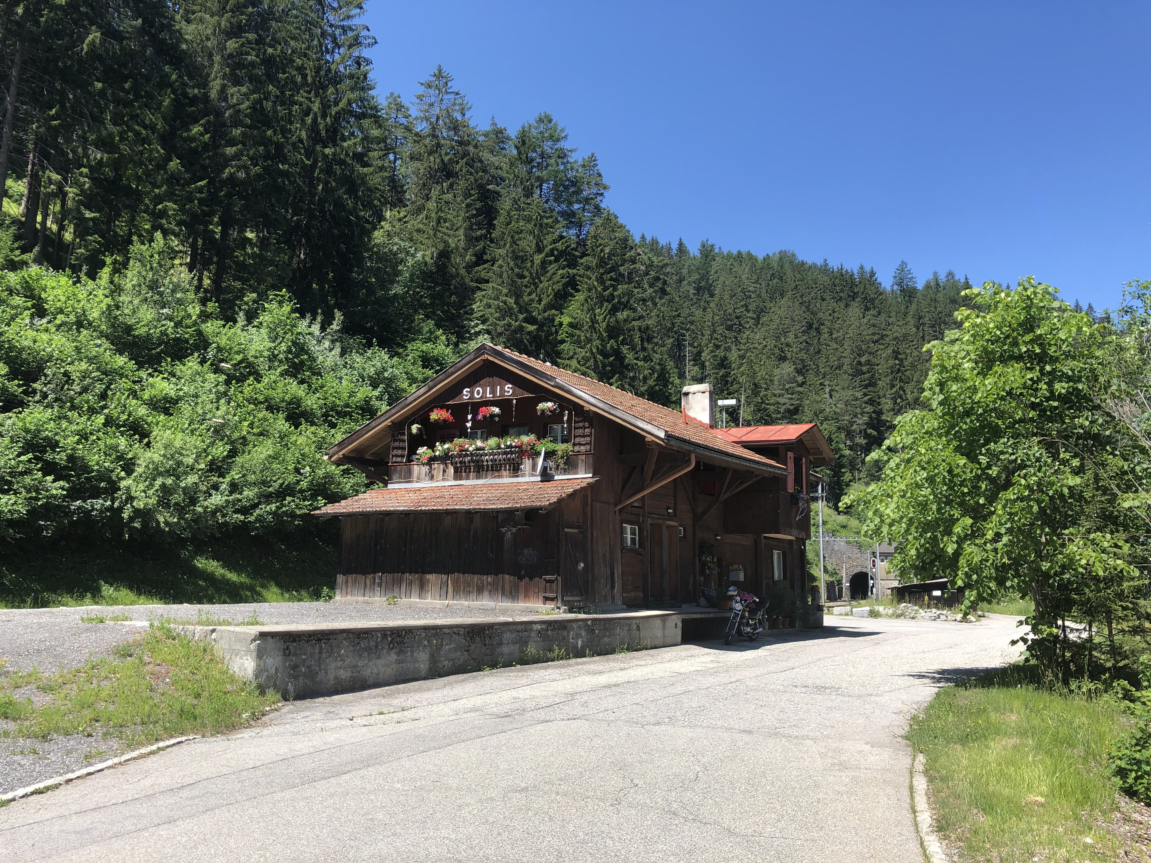 Solis